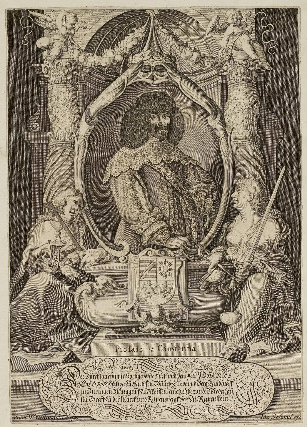 Grafik aus dem Klebeband Nr. 1 der Fürstlich Waldeckschen Hofbibliothek Arolsen Motiv: Johann Georg I. von Sachsen-Eisenach